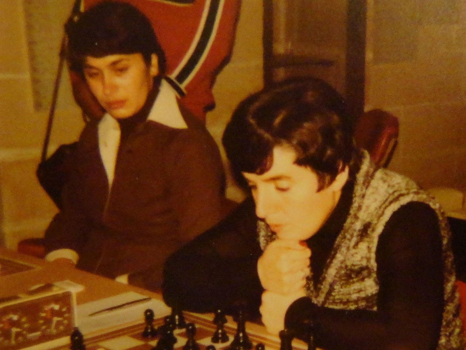 Nana Alexandria und Nona Gaprindaschwili, Schacholympiade 1980 in Valletta auf Malta.